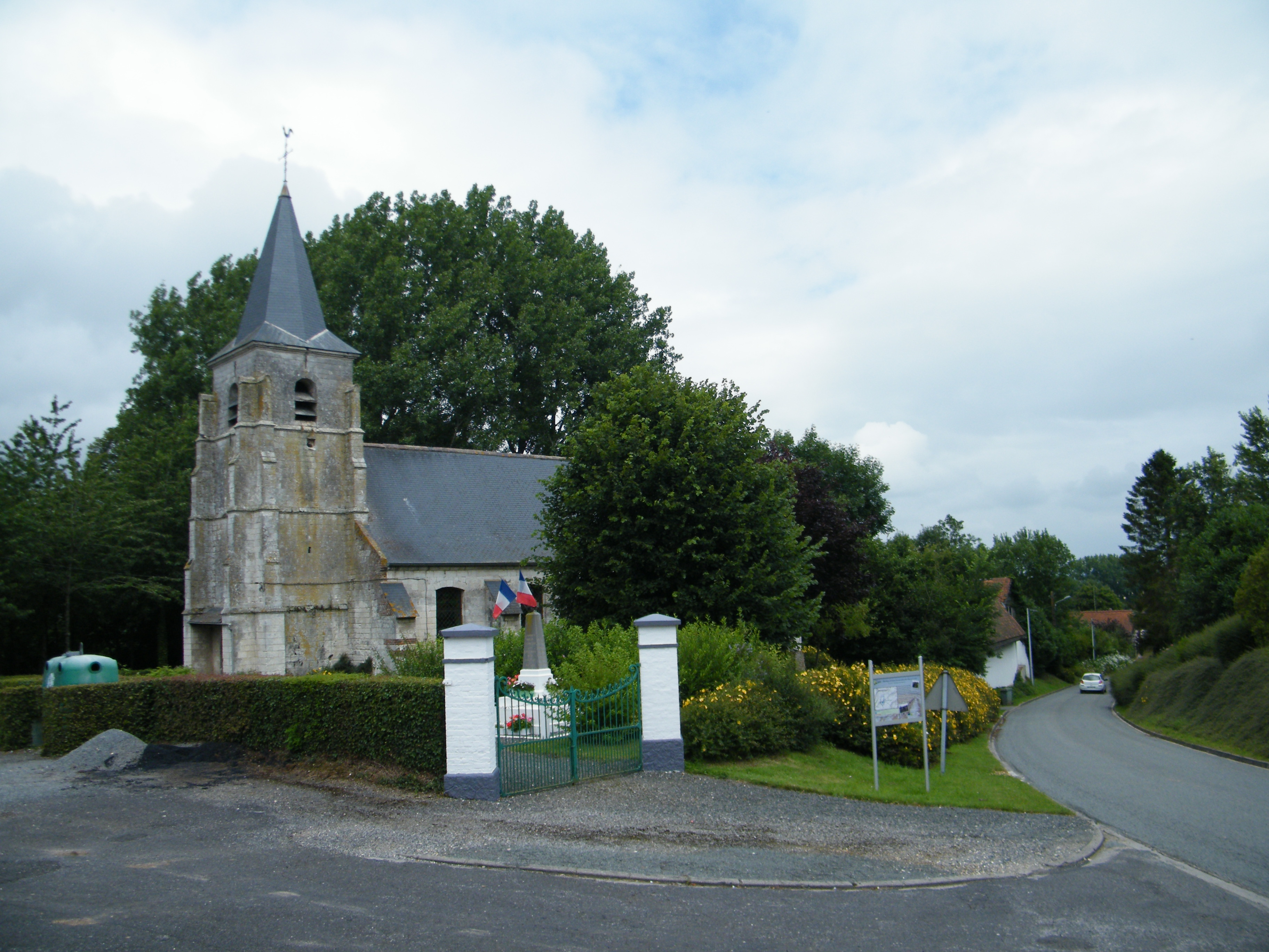 Église Notre-Dame-de-l'Assomption de Montigny-les-Jongleurs.